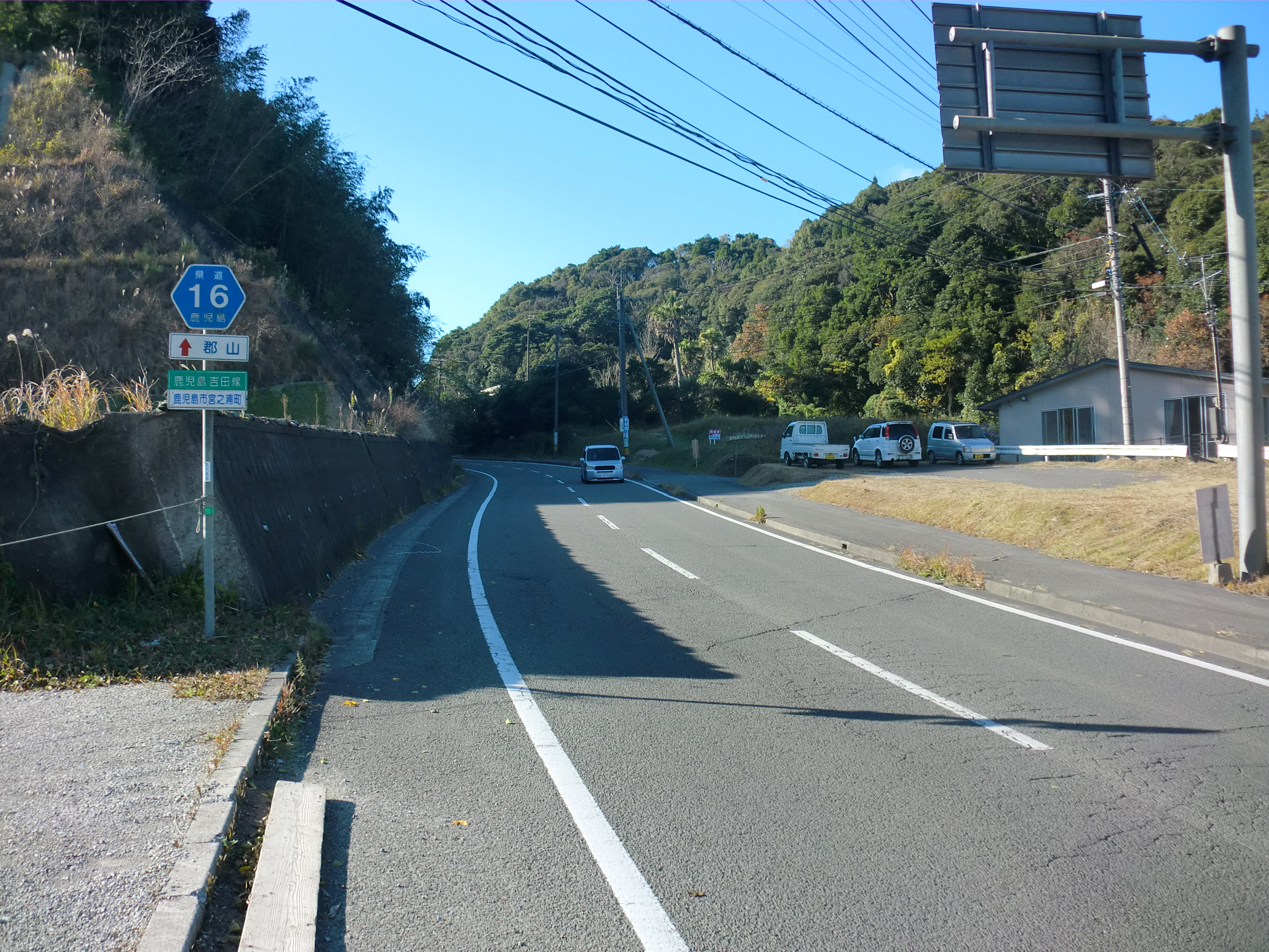 鹿児島県道16号鹿児島吉田線。鹿児島県宮之浦町で撮影